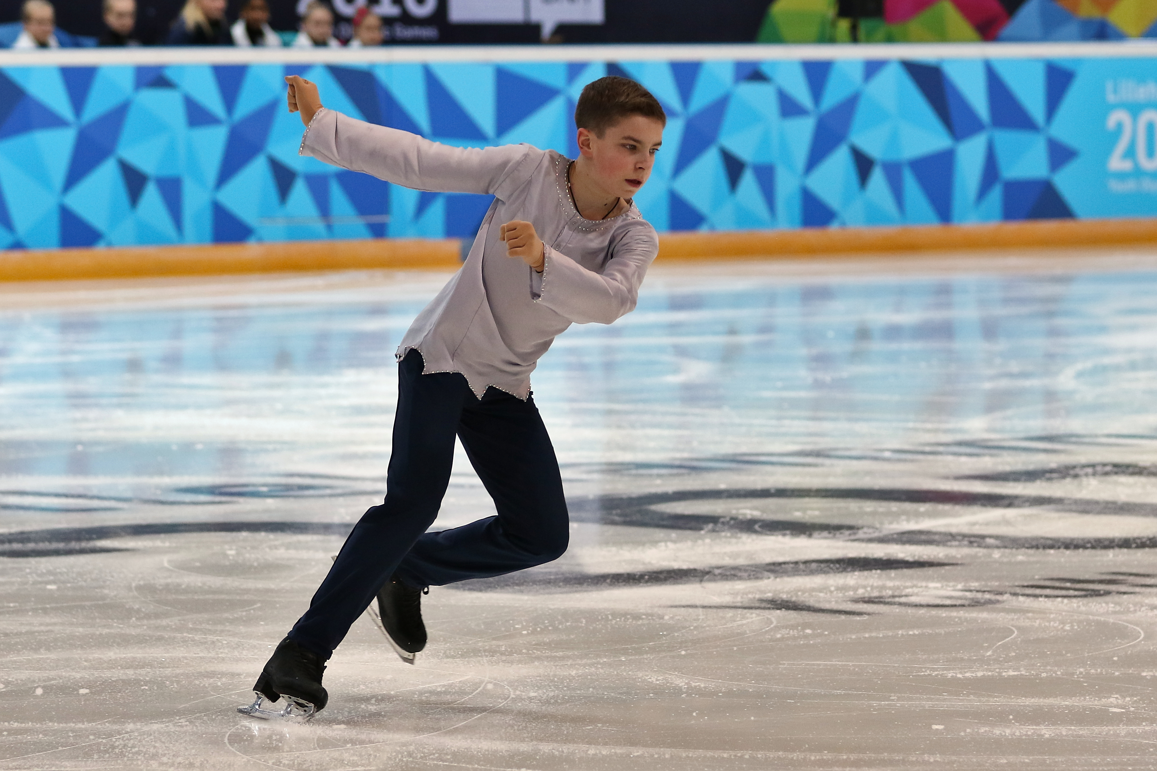 Lillehammer 2016 - Figure Skating Men Short Program - Ivan Shmuratko